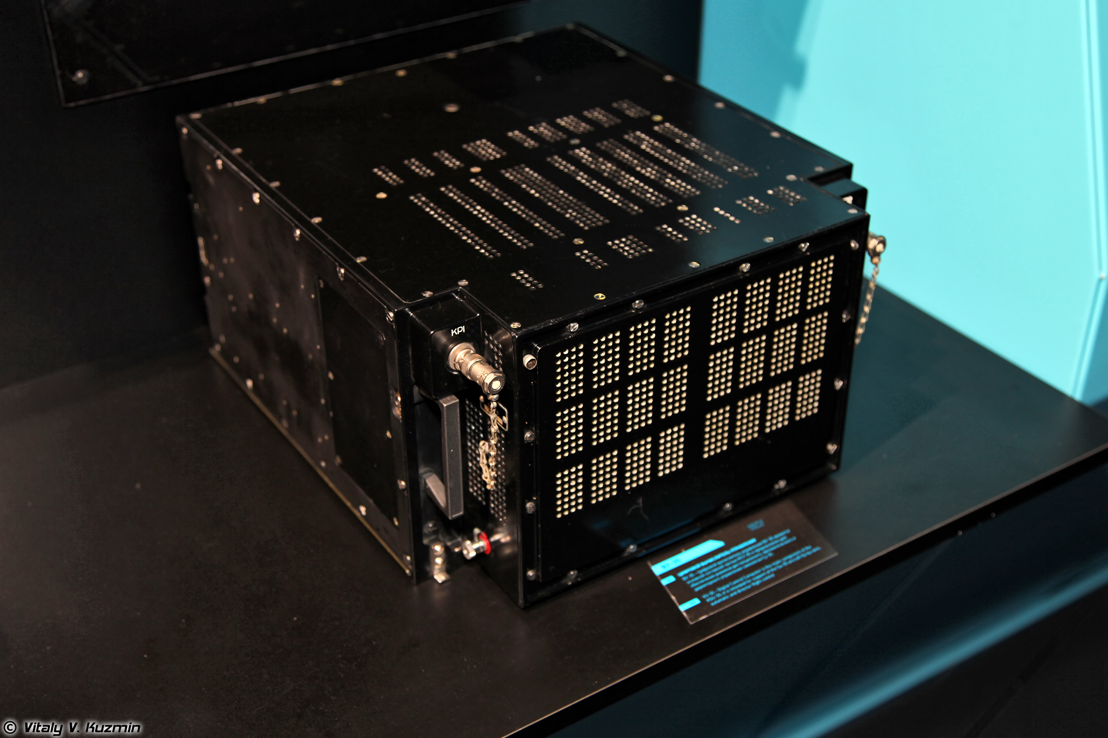 Цифровой вычислитель управления ВУ-35 для самолета Су-35 (Vu-35 digital control computer for Su-35)